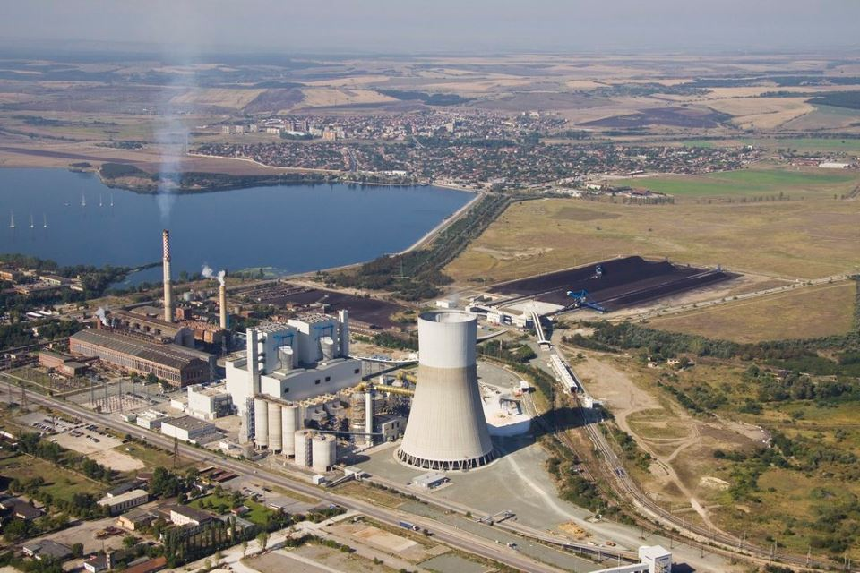 Гълъбово от високо, 2012 г.